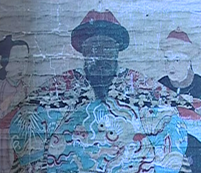 王進寶